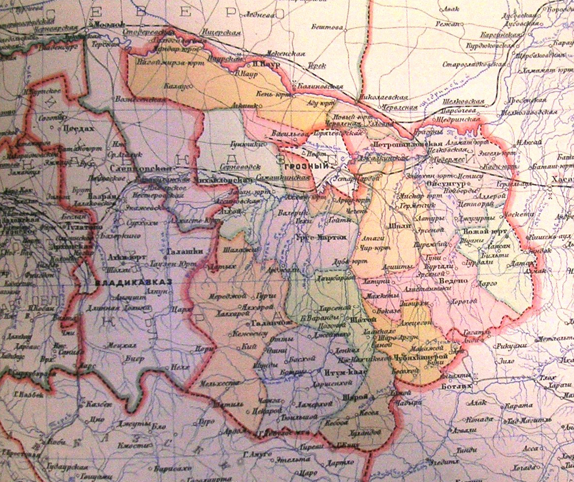 Нохчийн: Чеченская автономная область 1928